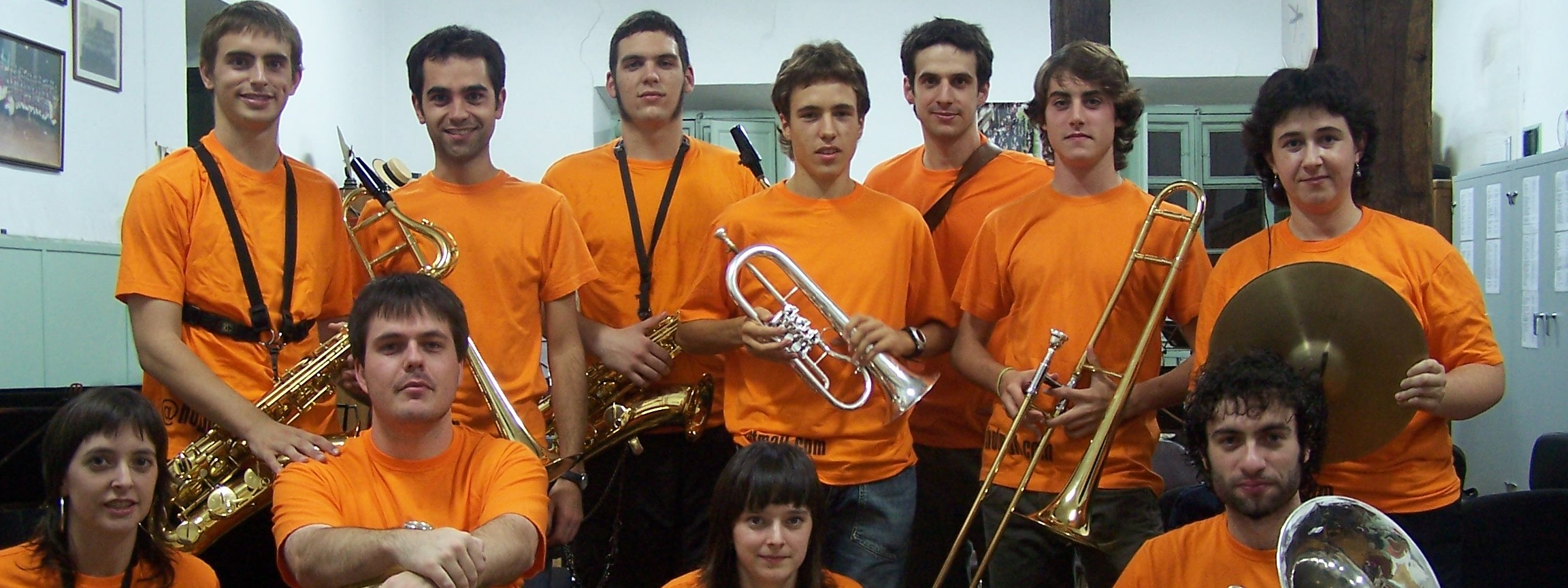 Burrunbazale Txaranga